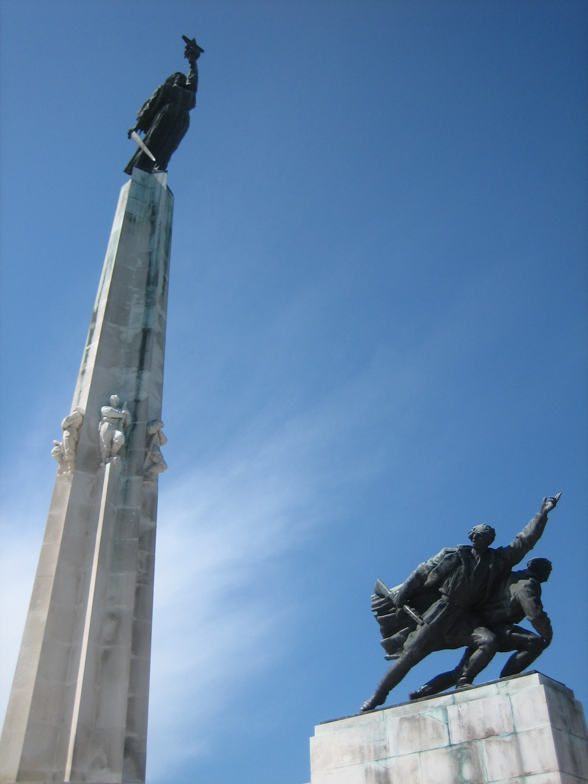 A. Augustinčić, Monument to the Battle of Batina (Batina, Croatia) / A. Augustinčić, Spomenik Batinskoj bitci (Batina).